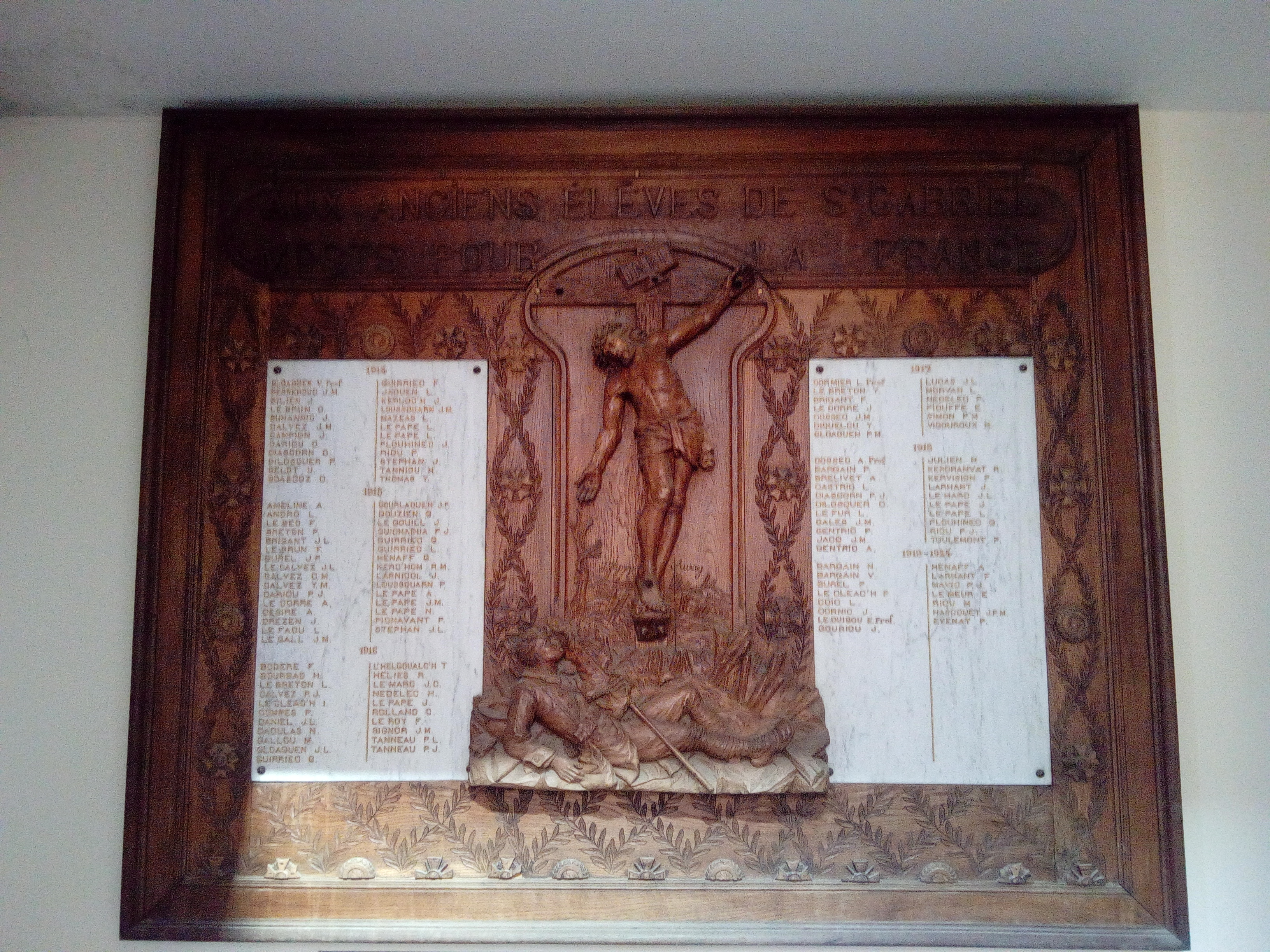 Monument en hommage aux victimes de la Première Guerre mondiale ayant passé par Saint-Gabriel (personnels et élèves)